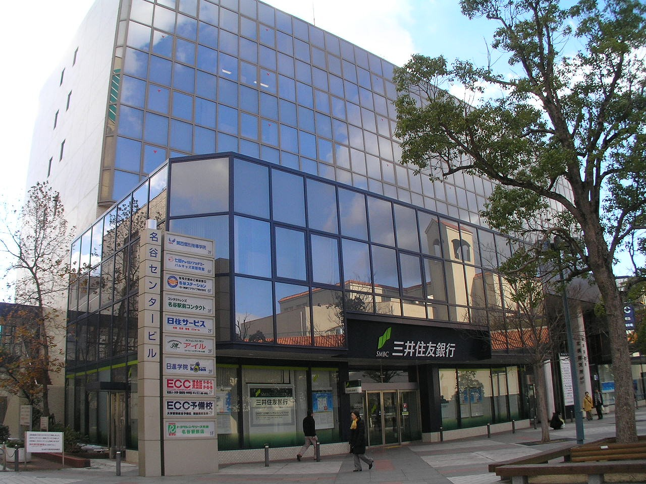 三井住友銀行 北須磨支店 名谷駅前 神戸市営地下鉄西神・山手線